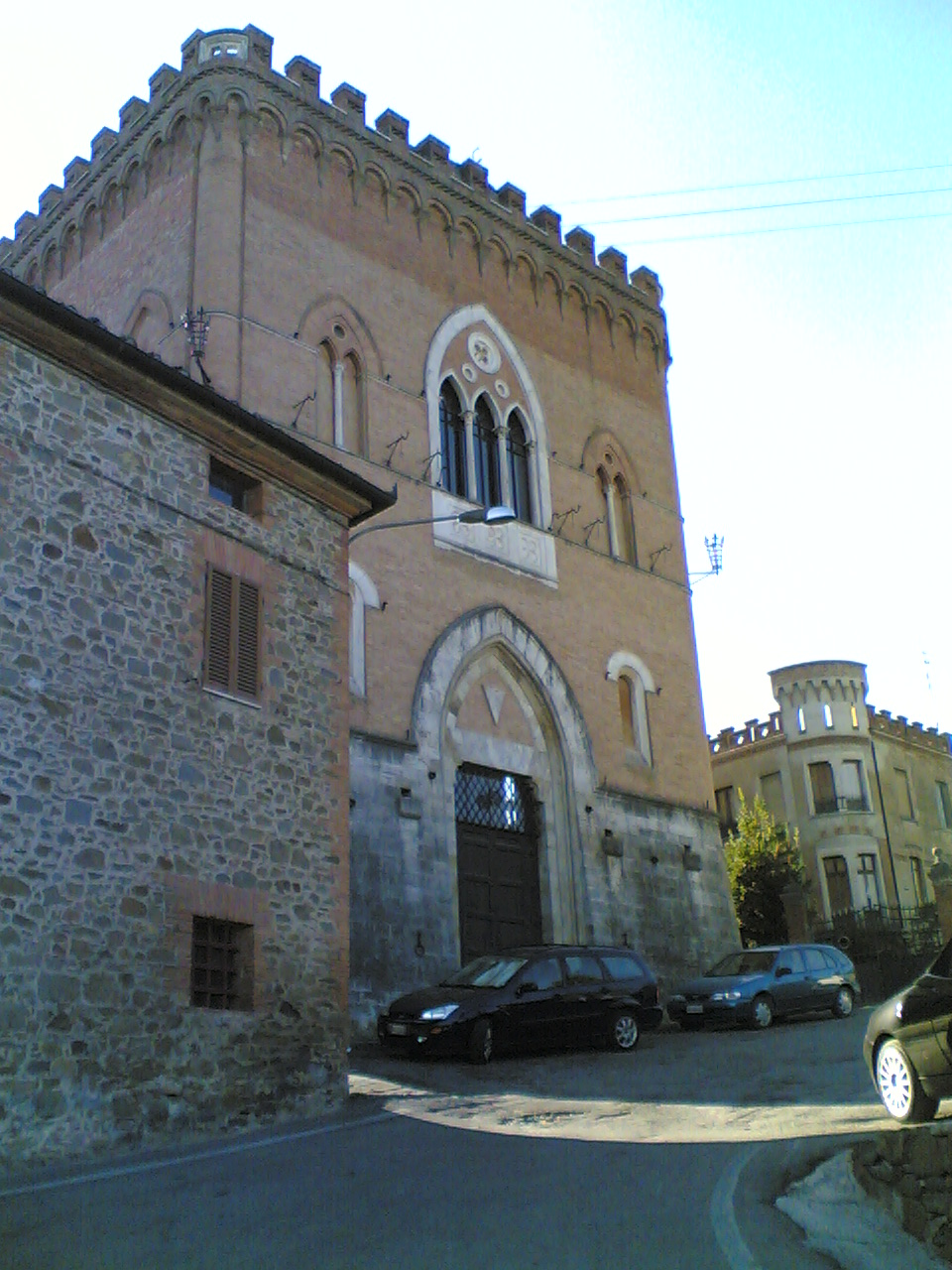 Esterno Castello di Farnetella (Siena)